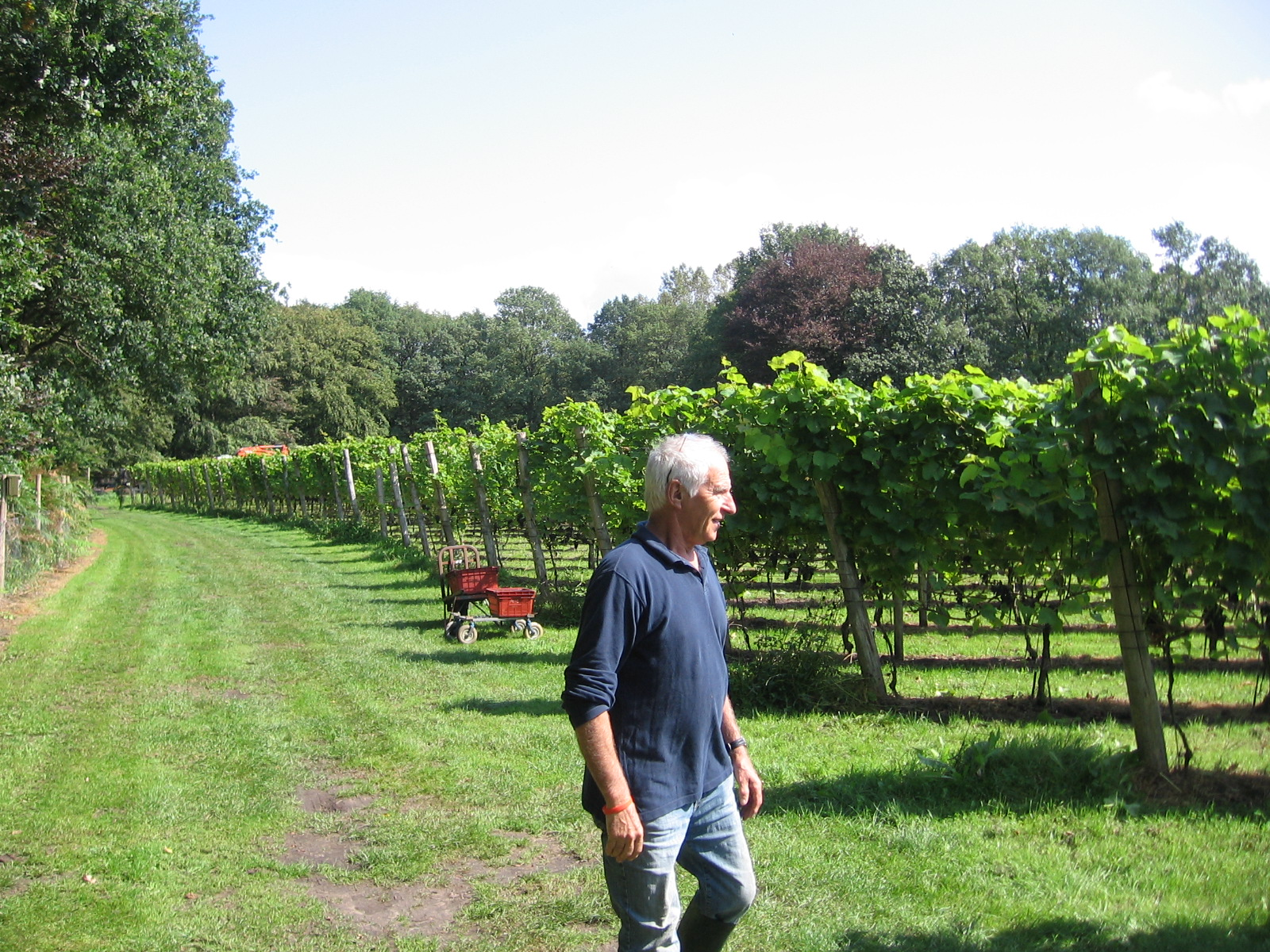 Vignes en hautain du domaine de Breede Beek